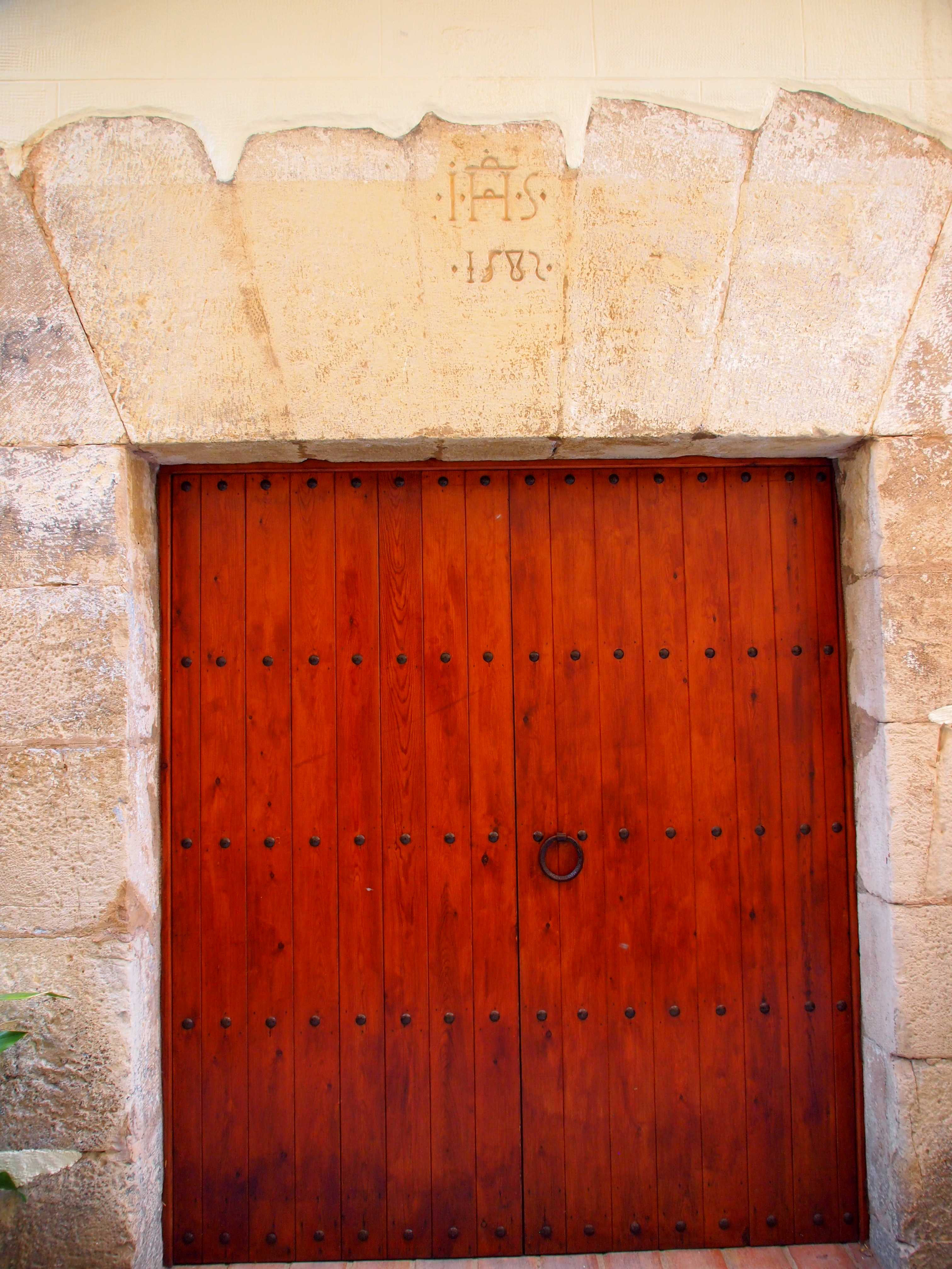 Portal del carrer Lloveras 14 de Cambrils